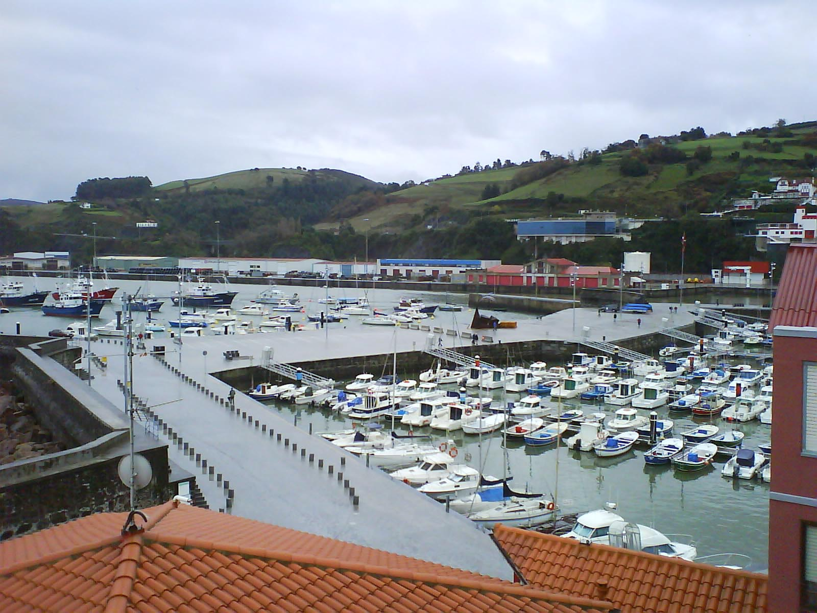 Vista general del puerto de Bermeo, Vizcaya (País Vasco, España).